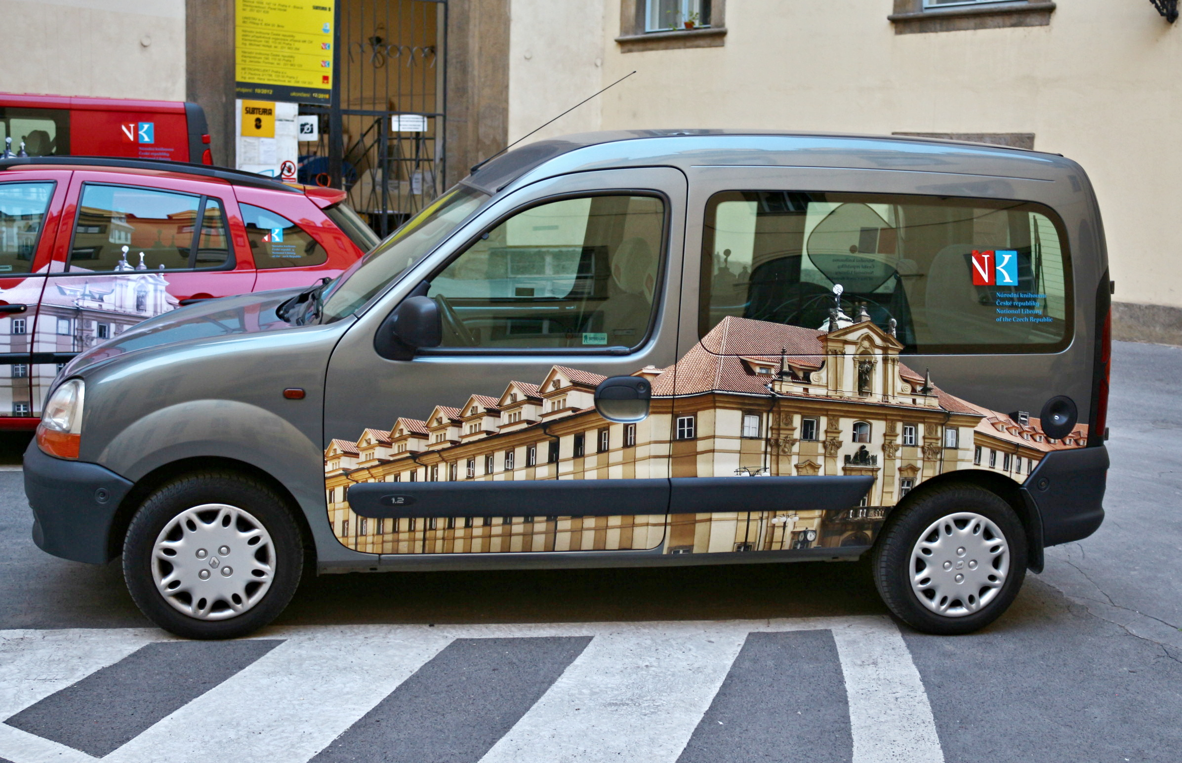 Klementinum